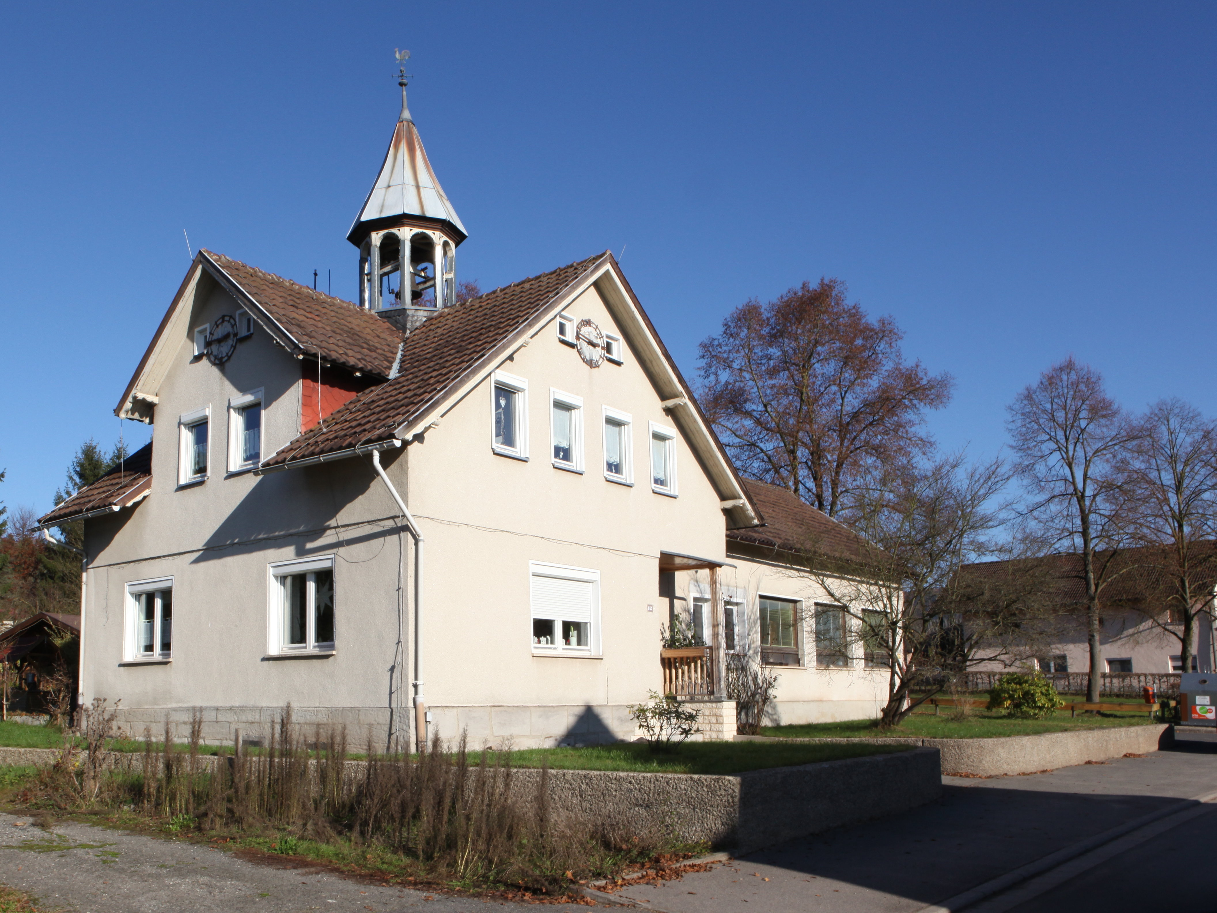 Alte Schule in Meilschnitz